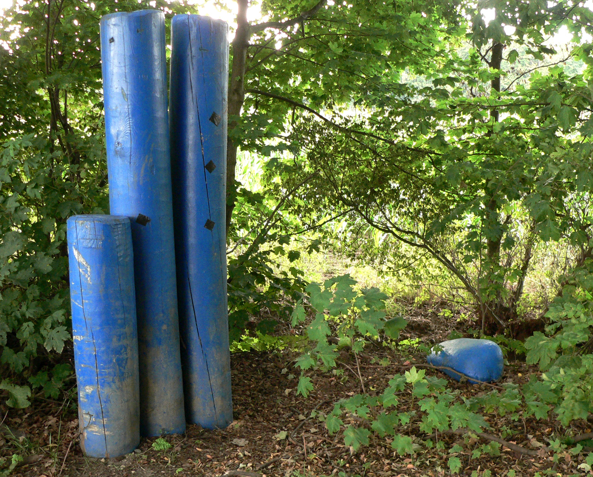 Blaue Stelen des Grüner Rings am Velberholz